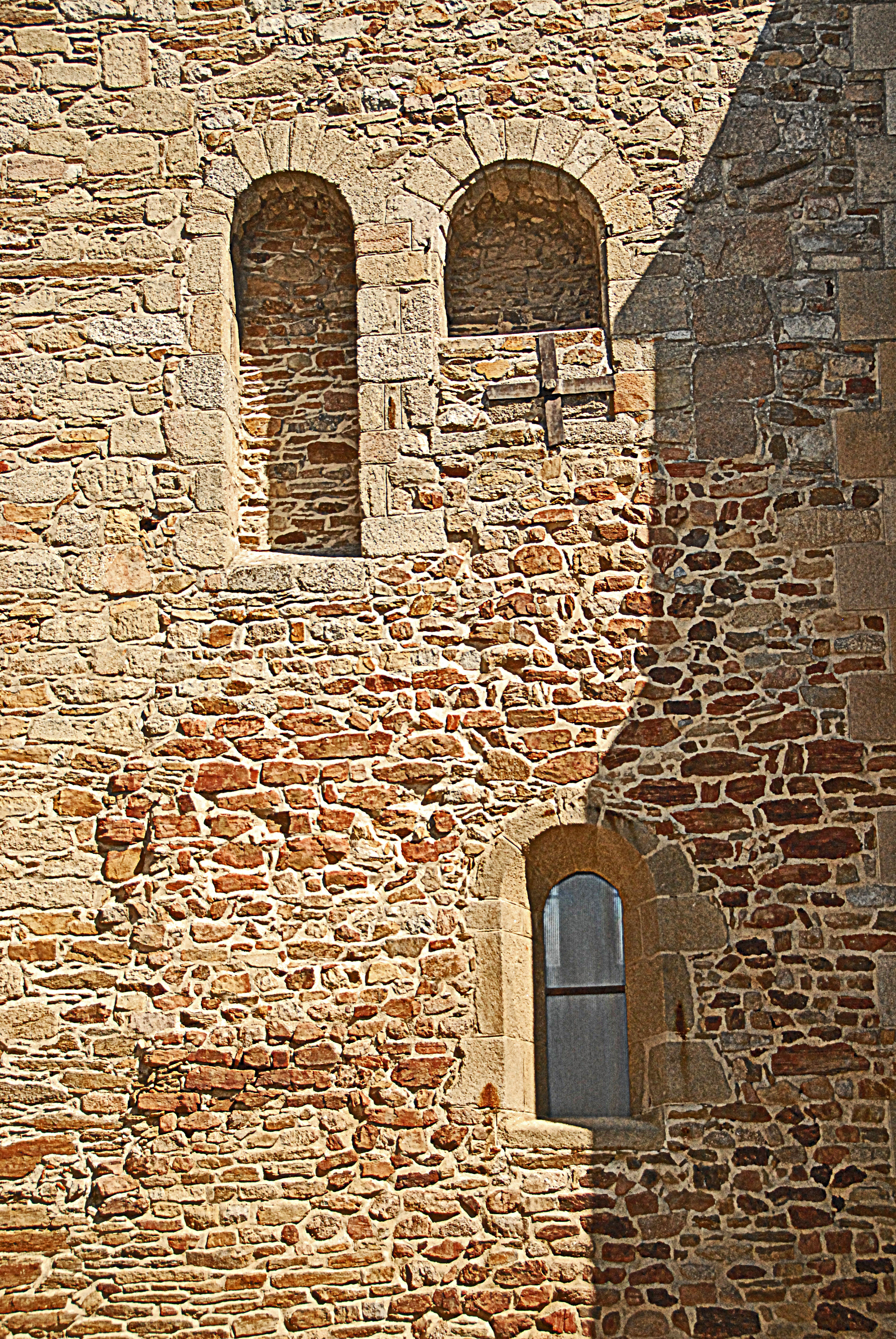 Stiftskirche St.-Léonard-de-Noblat, Detail in Joch 1, von S